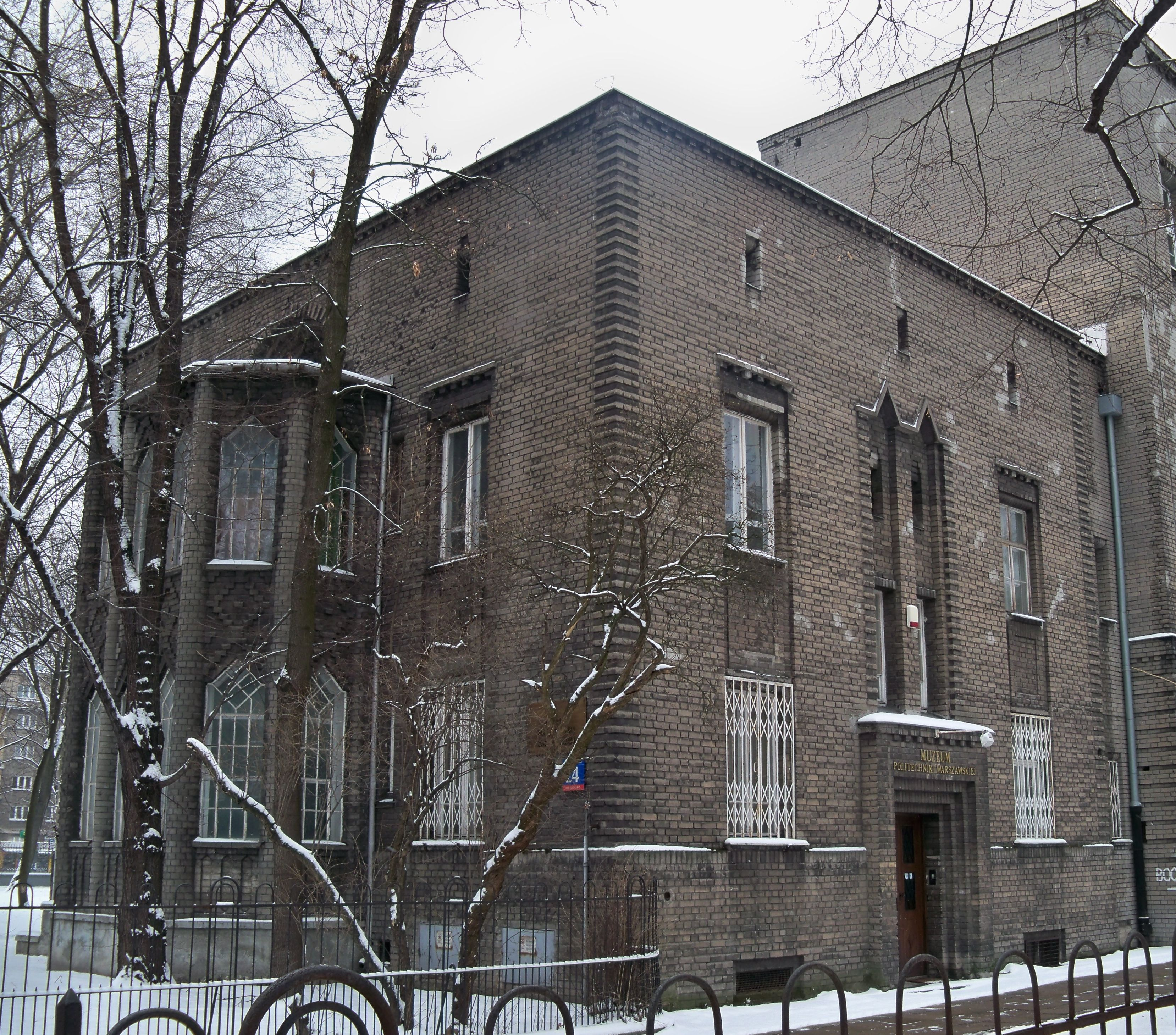 Muzeum Politechniki Warszawskiej, ul. Nowowiejska 24 w Warszawie.